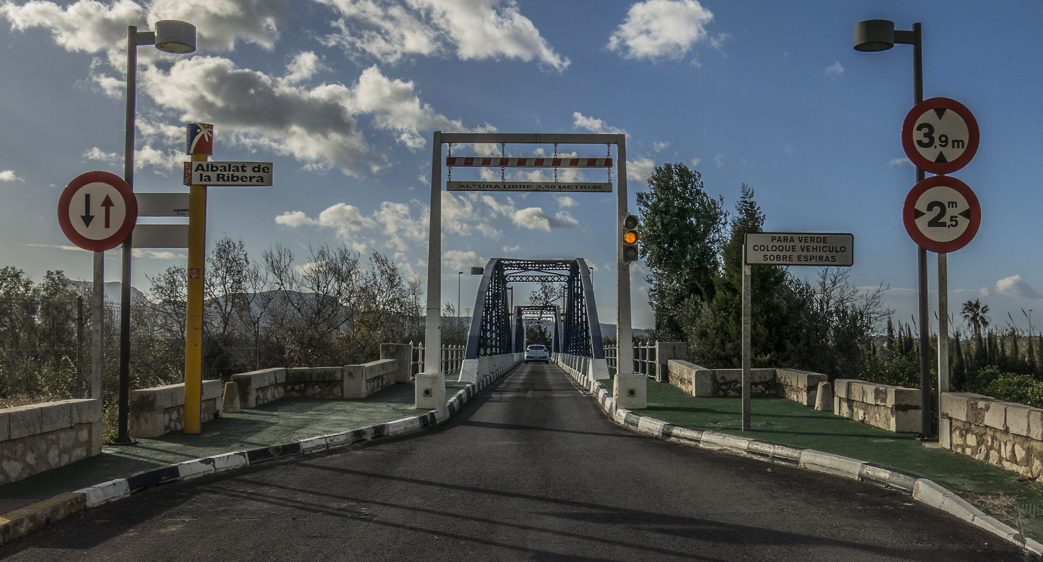 Pont de ferro a Albalat de la Ribera, municipi del País Valencià, a la comarca de la Ribera Baixa.